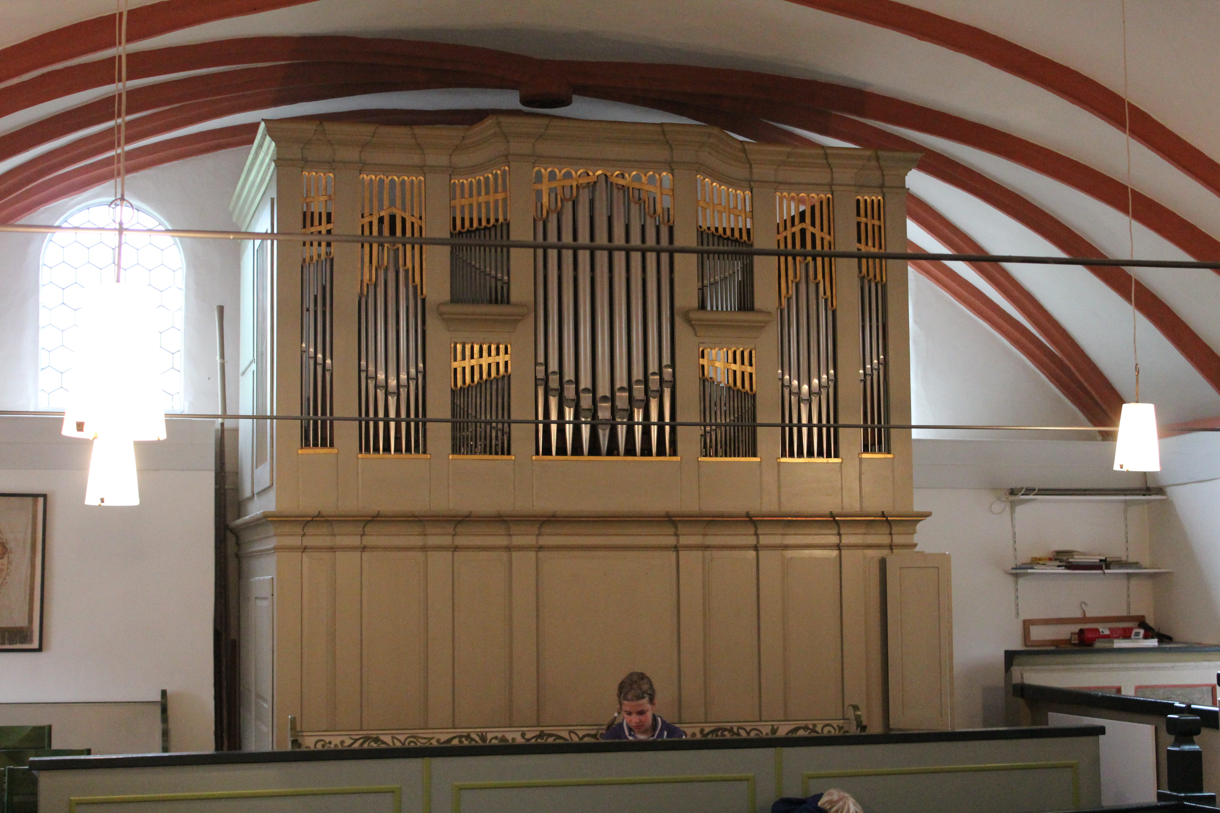 Orgel der Evangelischen Kirche Rodheim-Bieber, Gemeinde Biebertal, Landkreis Gießen, Hessen, Deutschland